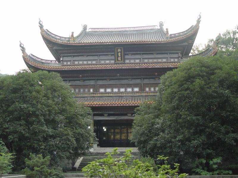 中文（中国大陆）: 御书楼